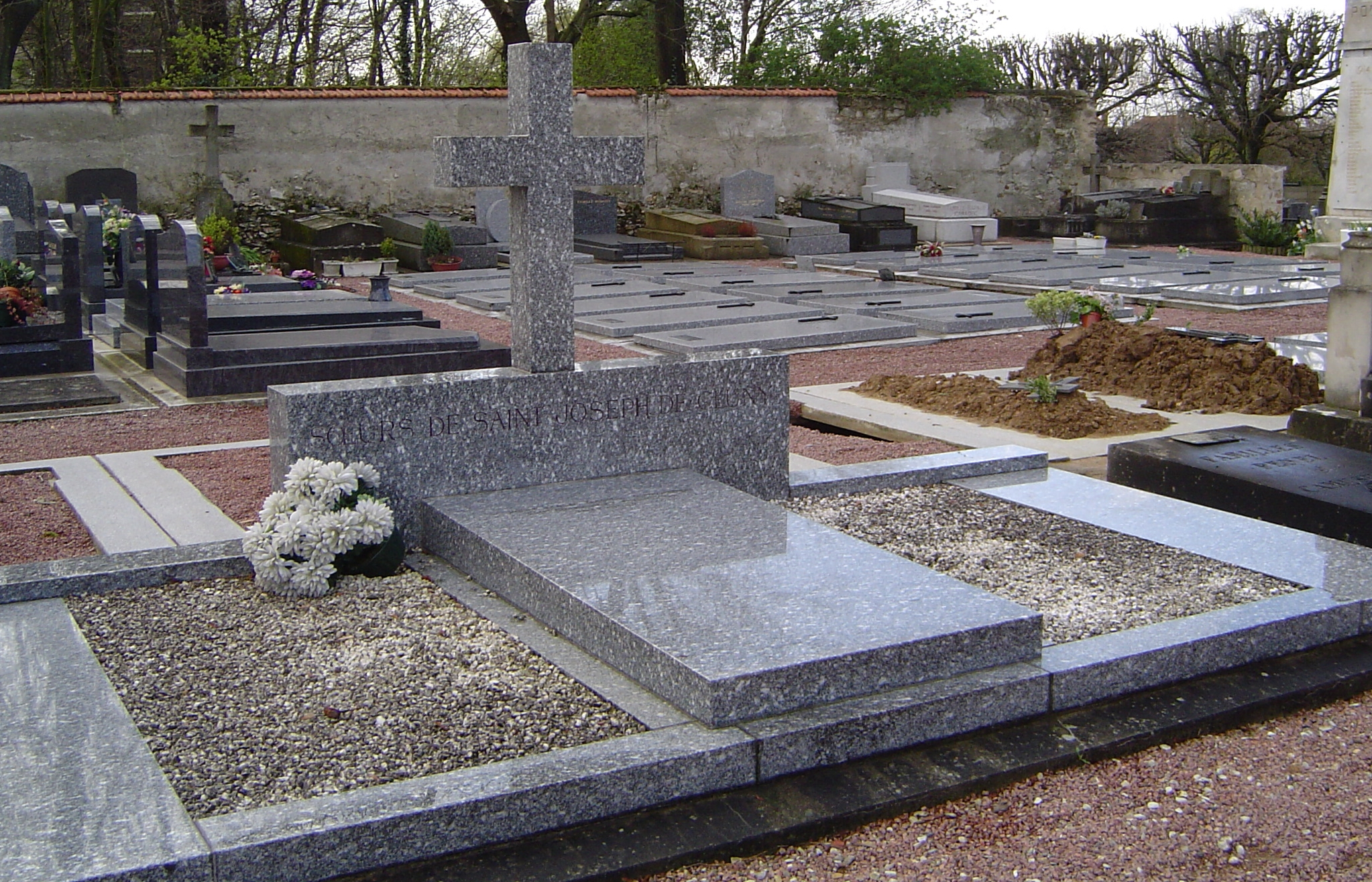 Cimetière d'Antony